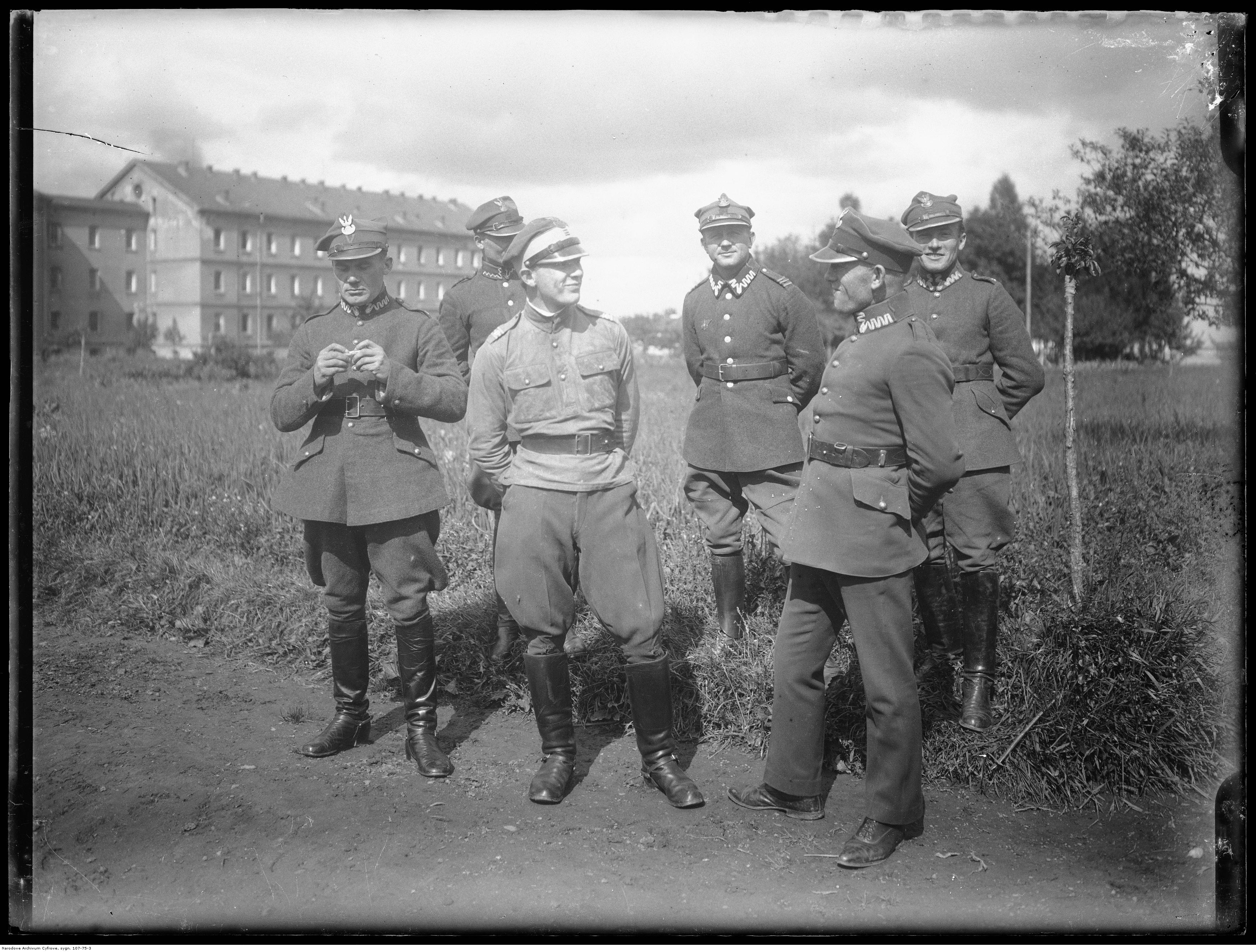 Grupa podoficerów stojąc (na tle klasztoru).